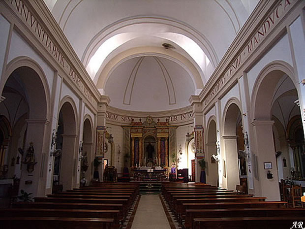 Vista desde dentro del propio templo.